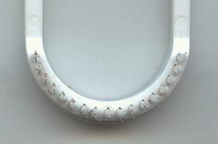 Zungenbuerste